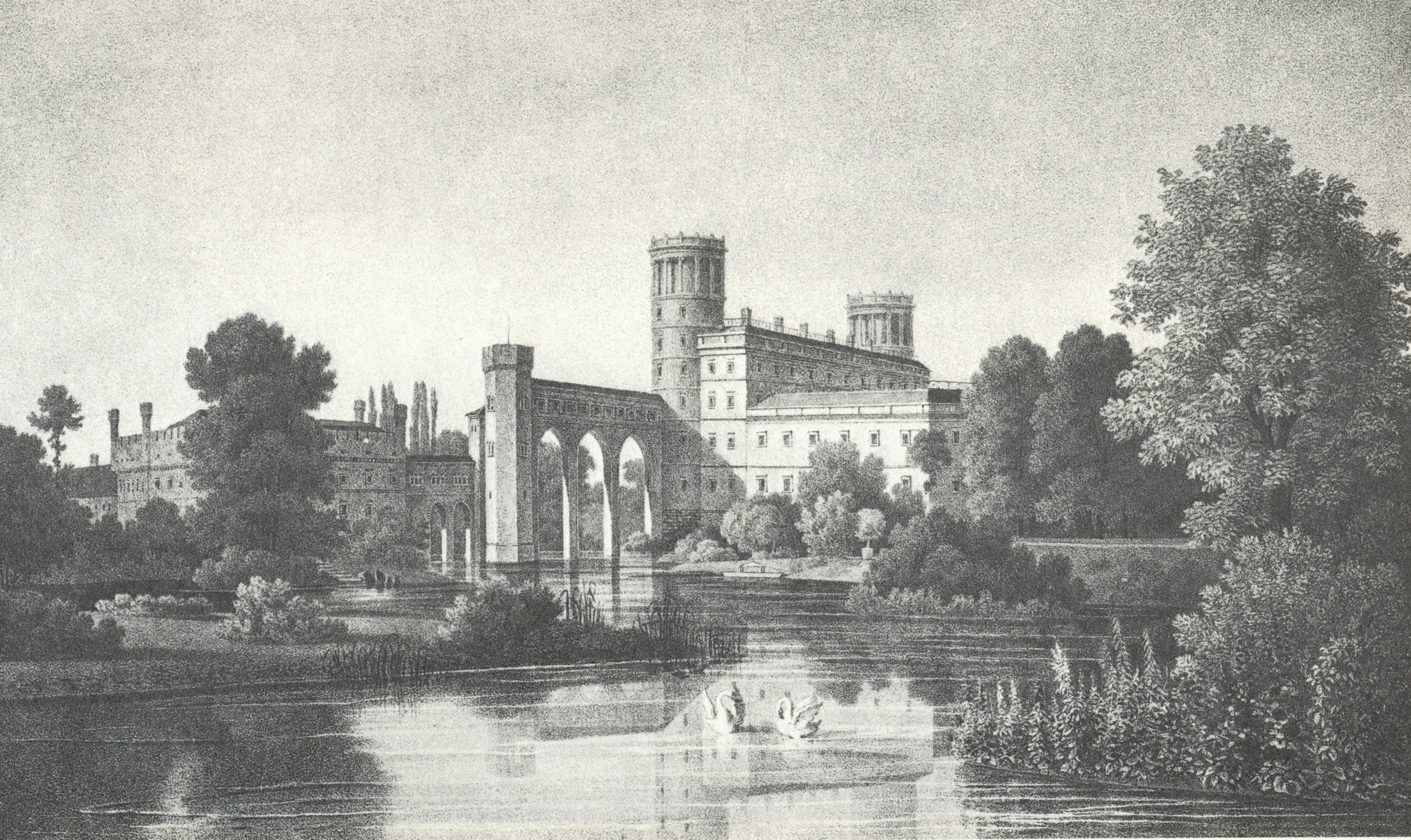 Schloss Muskau, Umbauentwurf von Schinkel, Tafel XX der "Andeutungen über Landschaftsgärtnerei"